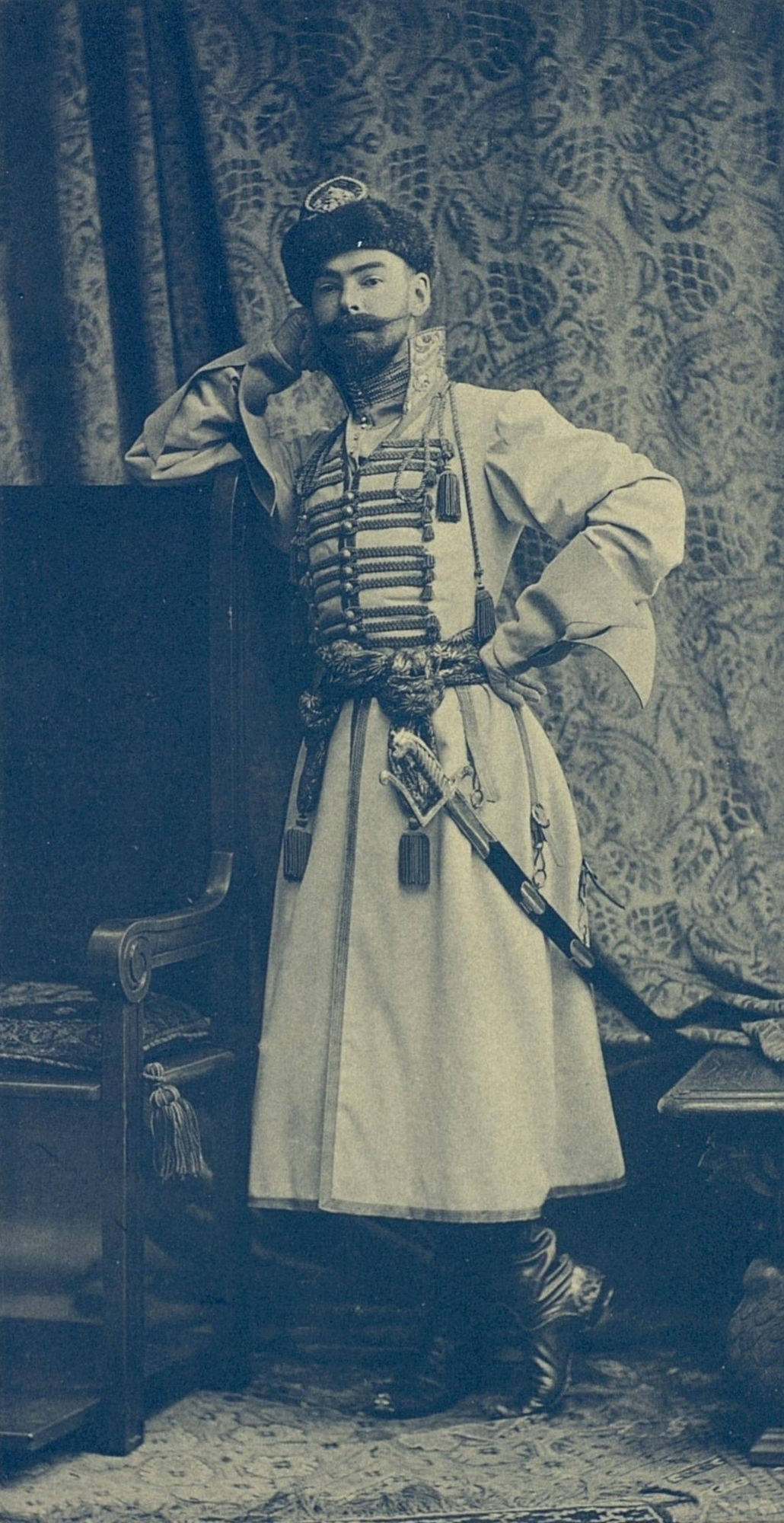 Адъютант Е.И.В. Главнокомандующего войсками Гвардии Петербургского военного округа (Великого Князя Владимира Александровича) Граф Михаил Николаевич Граббе, в костюме жильца 1617 года. Подъесаул.